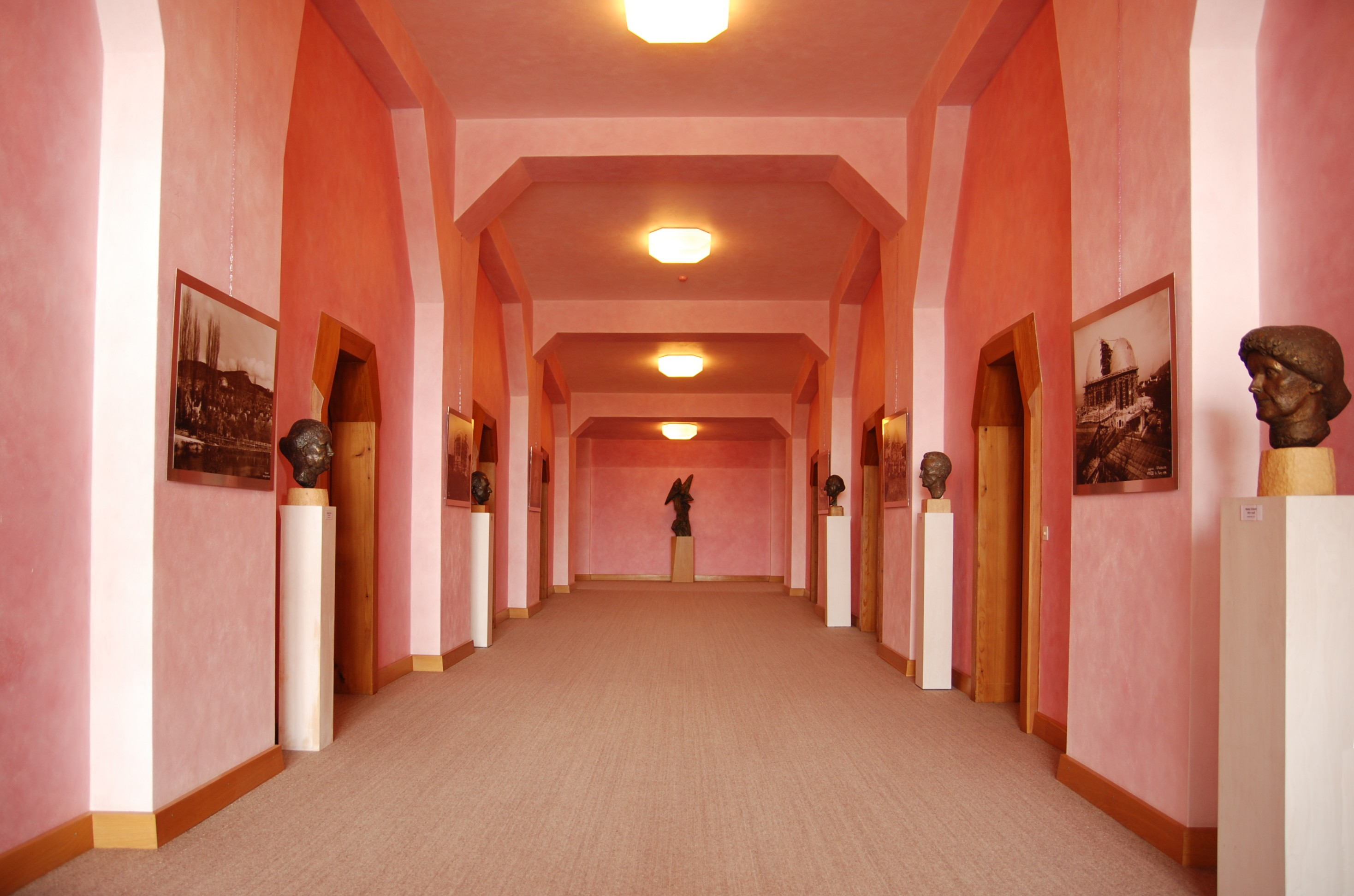 Innenansicht im Goetheanum